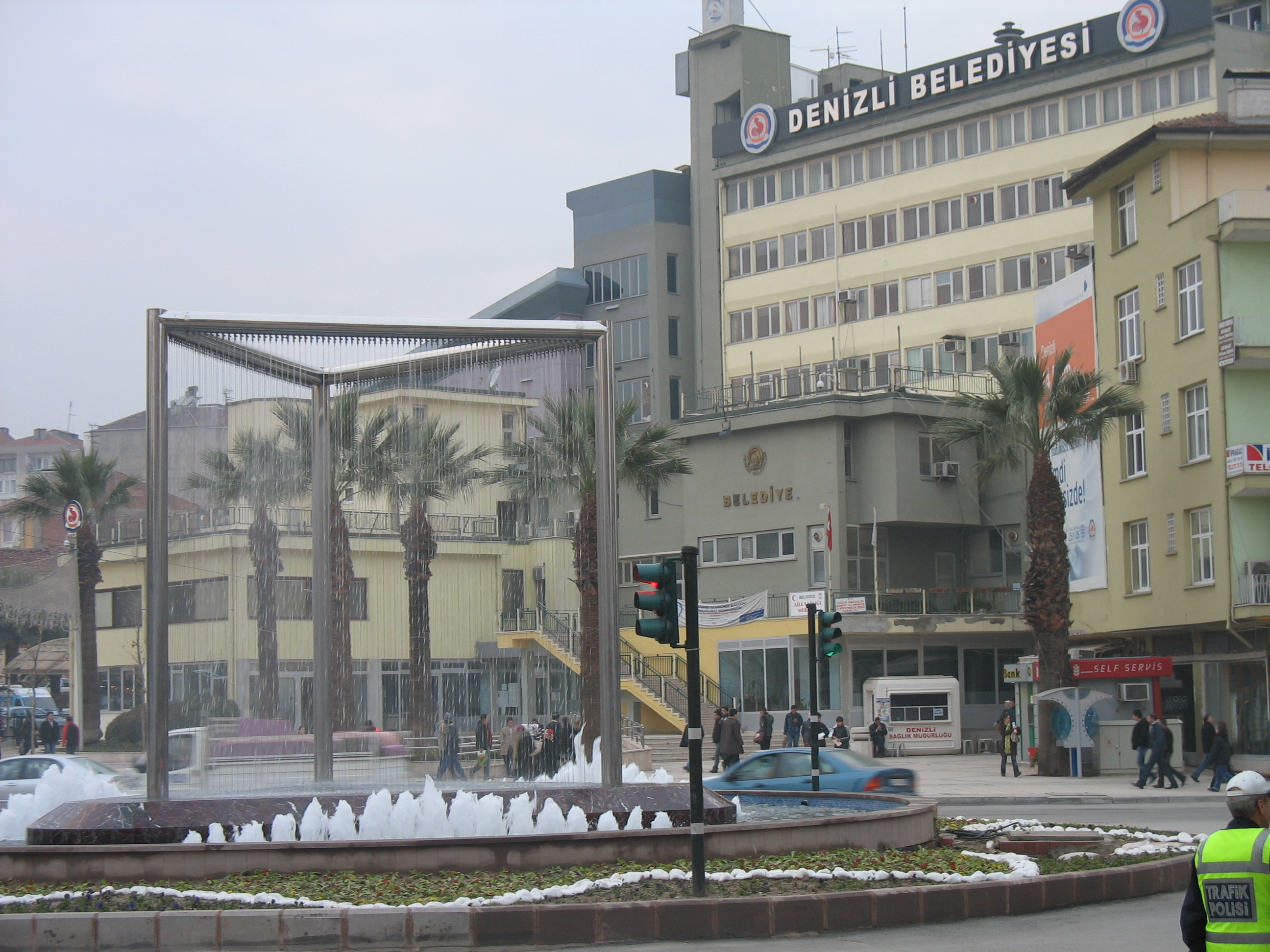 Denizli belediyesi Delikliçınar Meydanı